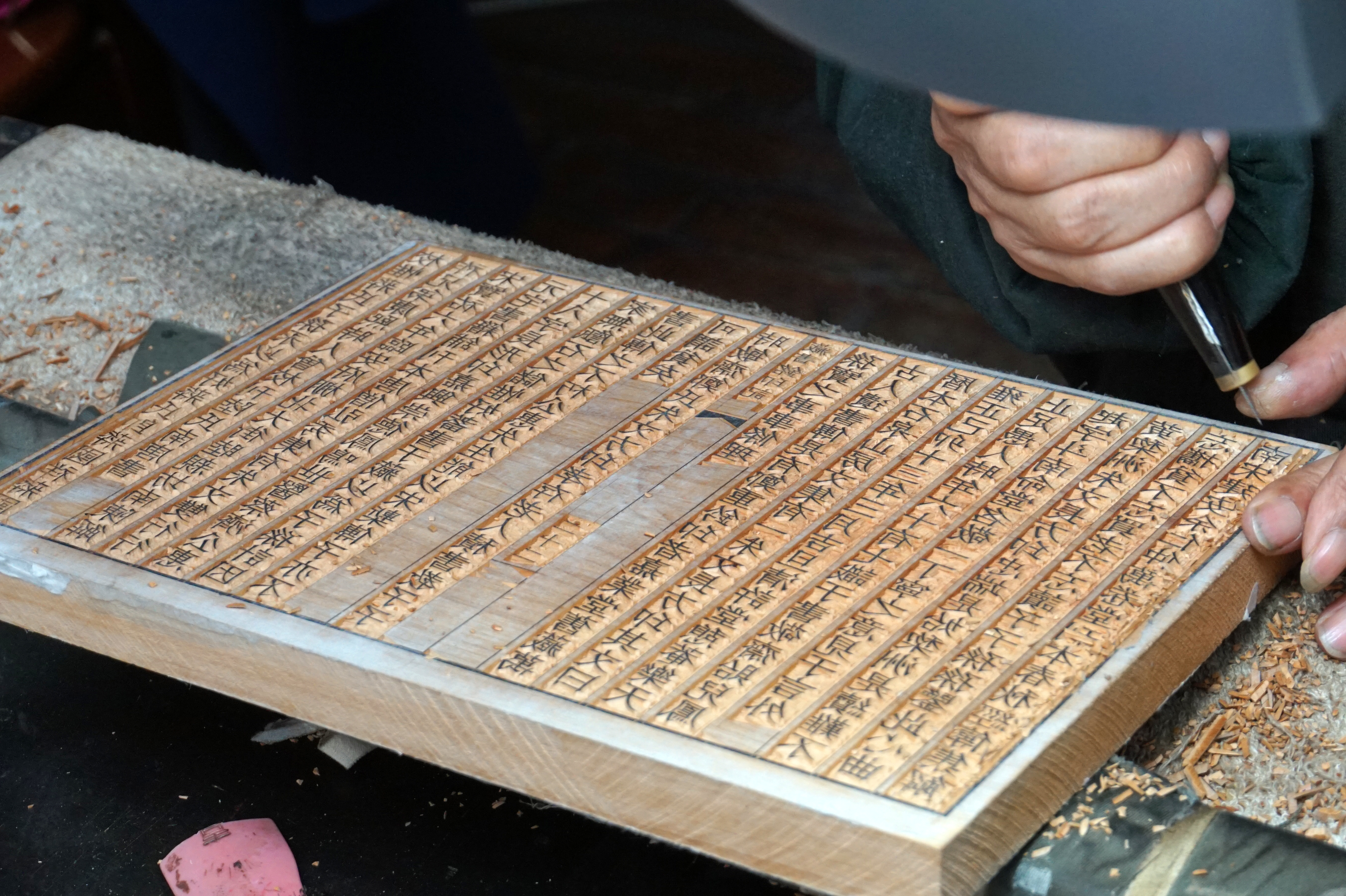 扬州中国雕版印刷博物馆的雕版刻制展示。